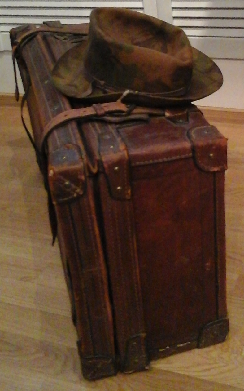 Чемодан, с которым 4 июня 1972 года Иосиф Бродский навсегда покинул родину, увозя печатную машинку, две бутылки водки для Уистена Хью Одена и сборник стихов Джона Донна. Американский кабинет Иосифа Бродского в Музее Анны Ахматовой в Фонтанном доме. Фотография 2014 года